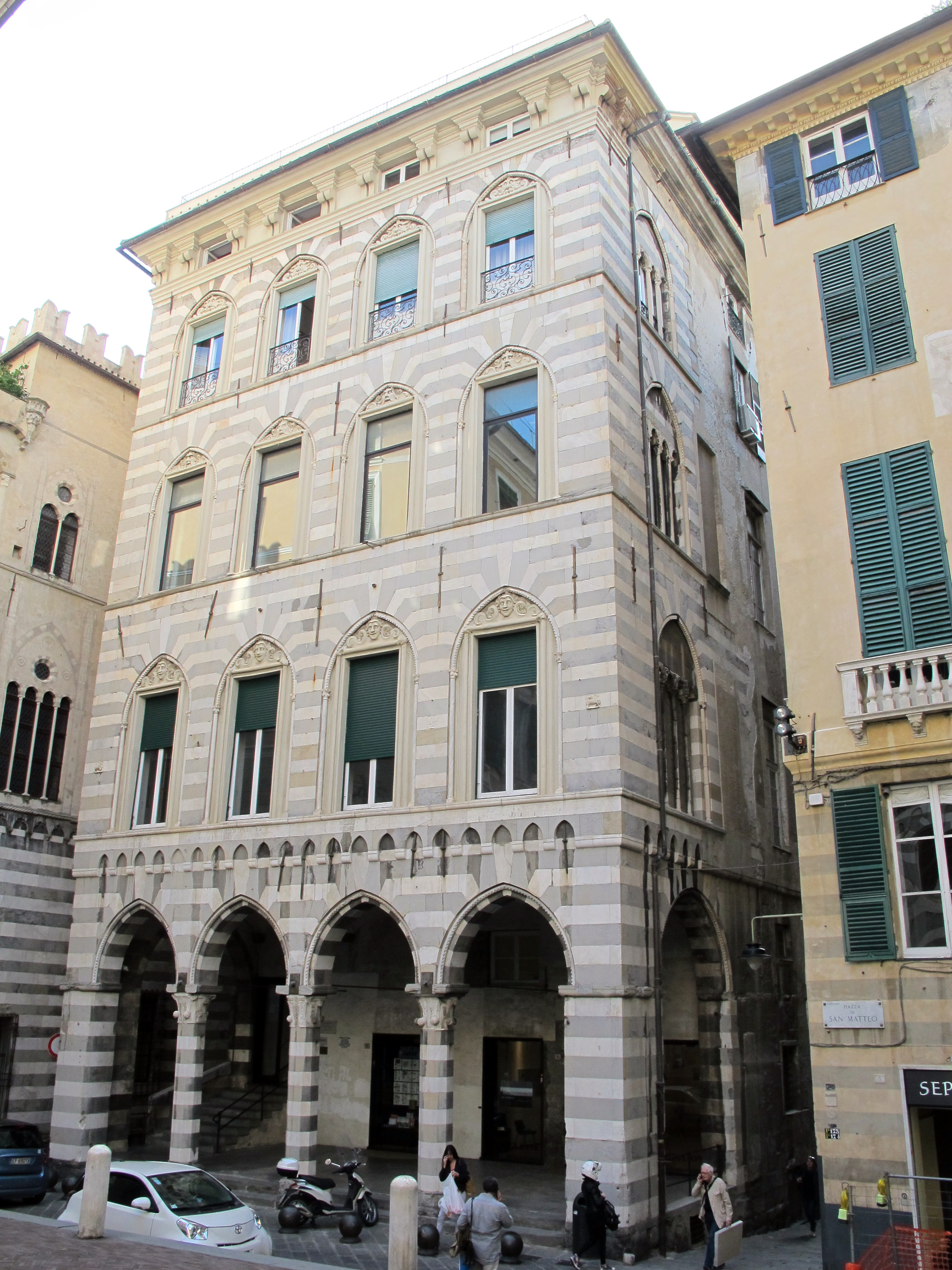 Genova, Liguria